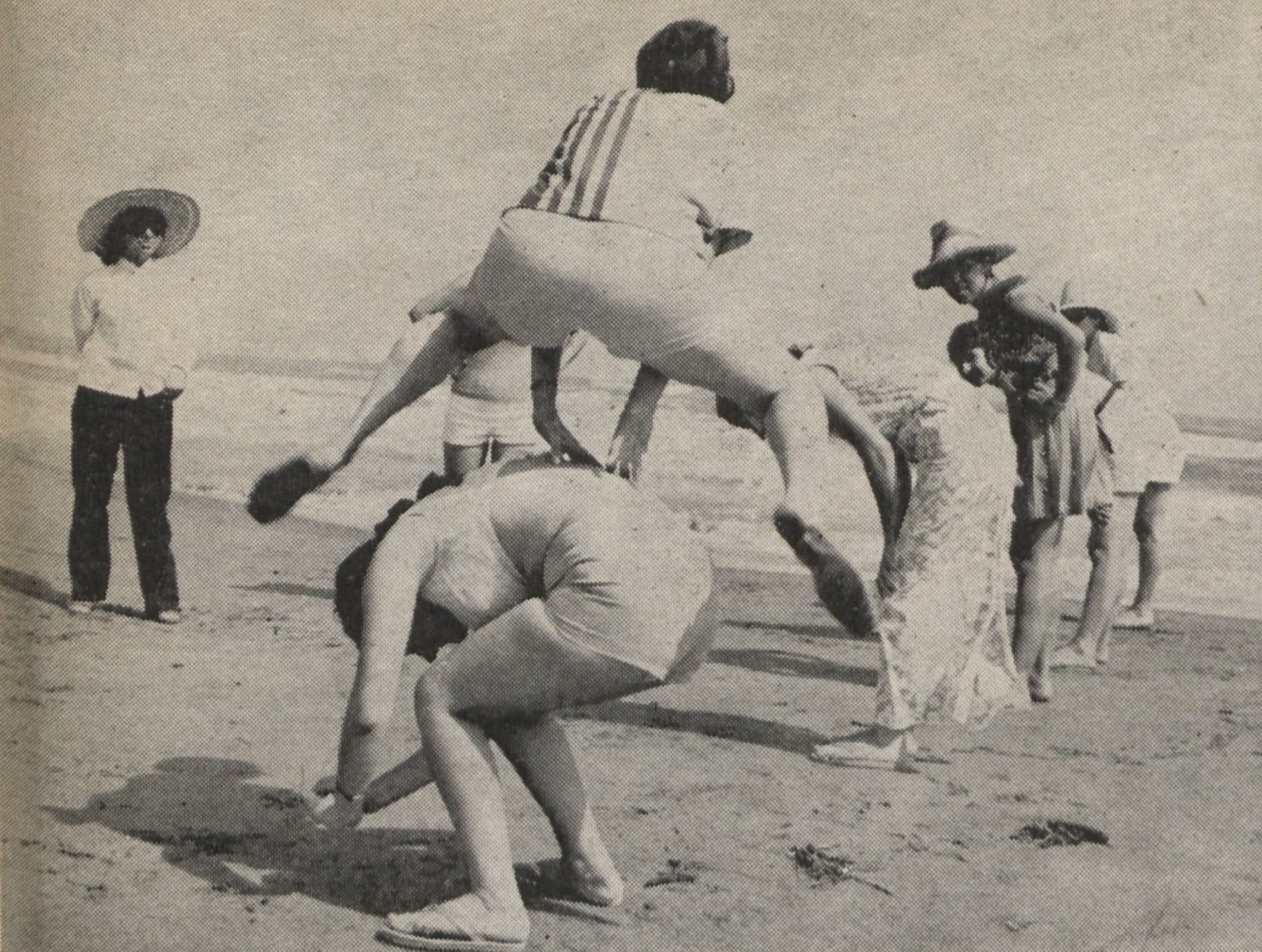 دانشجویان در حال بازی جفتک چارکش، اردوی دانشجویی دختران در ساحل دریای خزر (بابلسر)